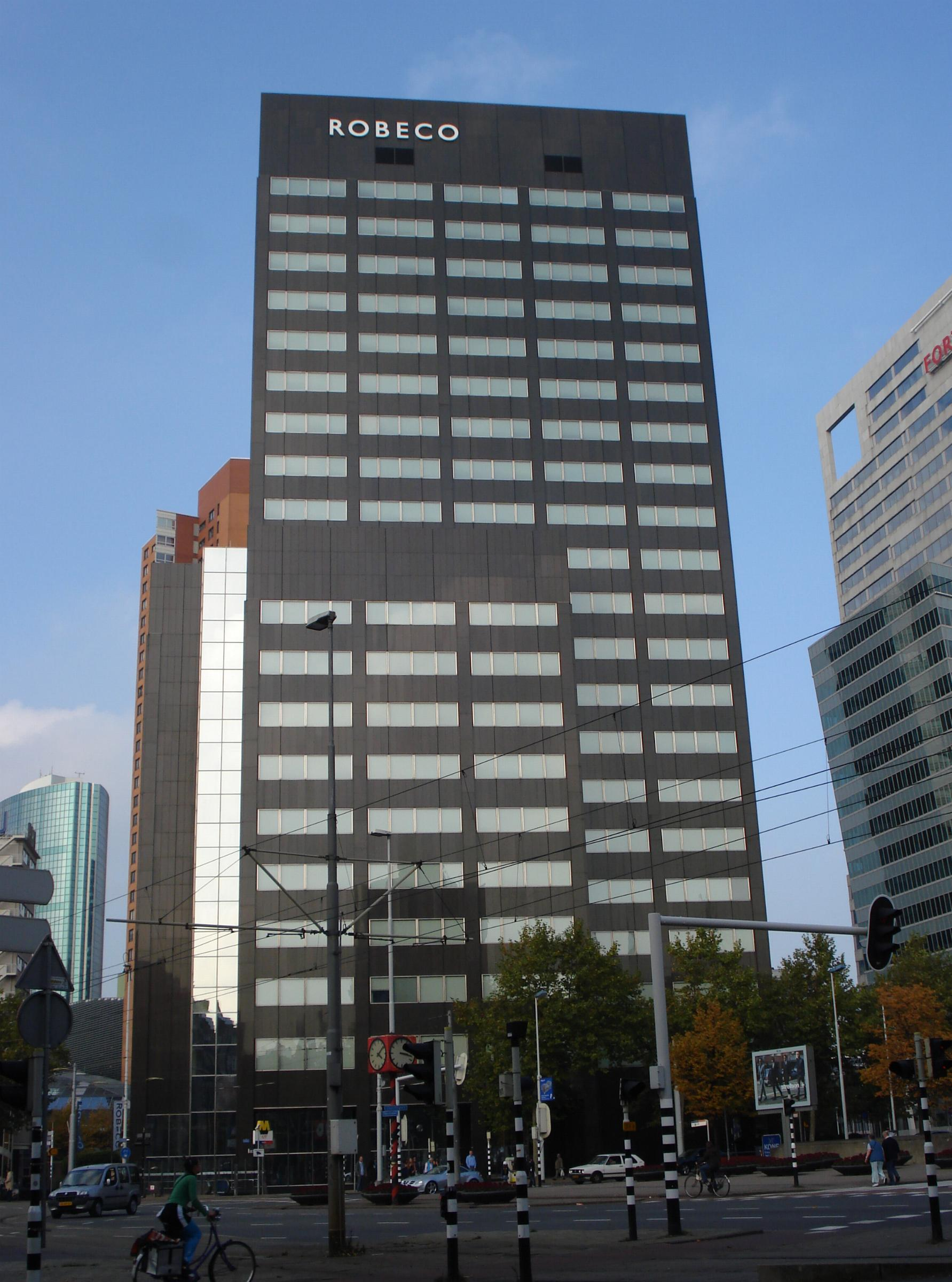 Rotterdam, Coolsingel. Robecogebouw.